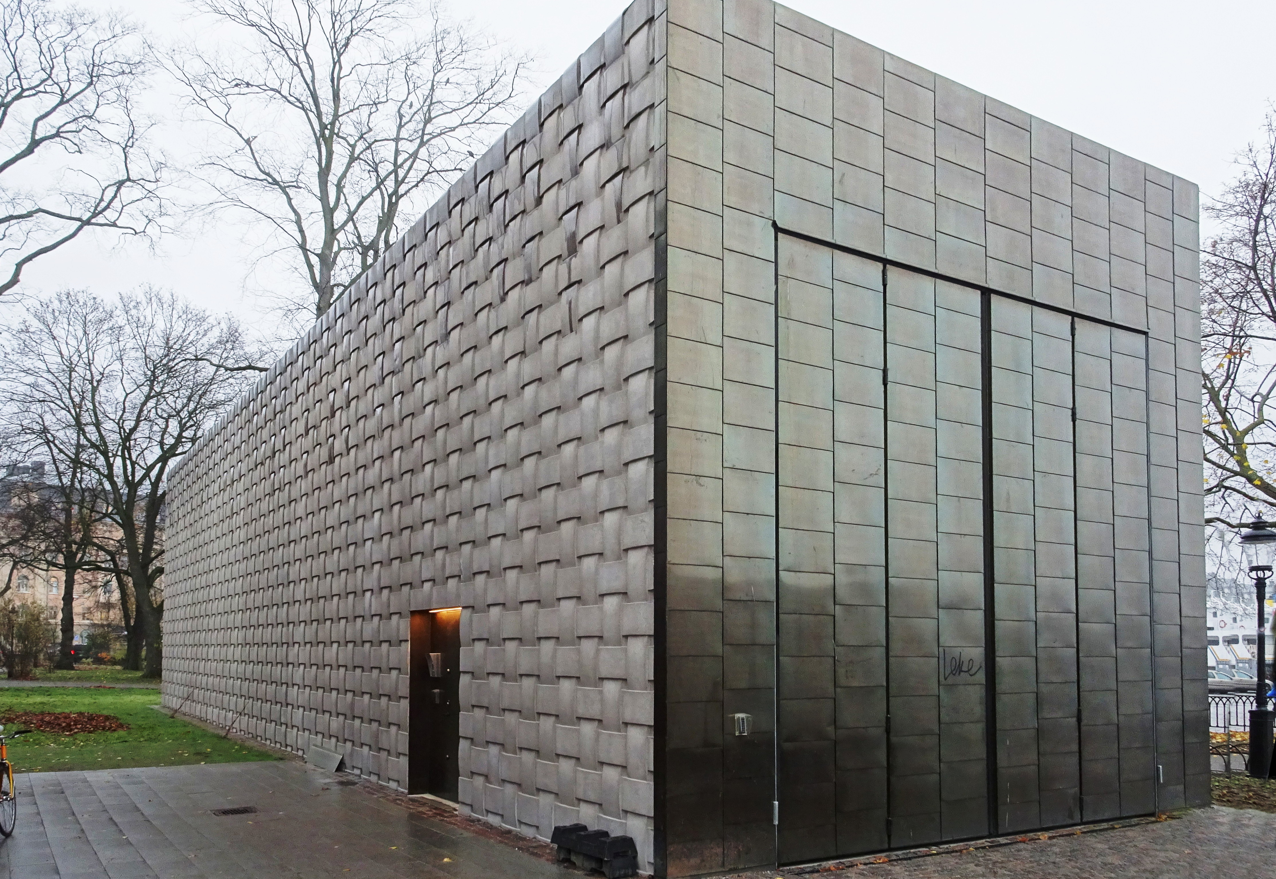 Nationalmuseum Stockholm, lastintaget